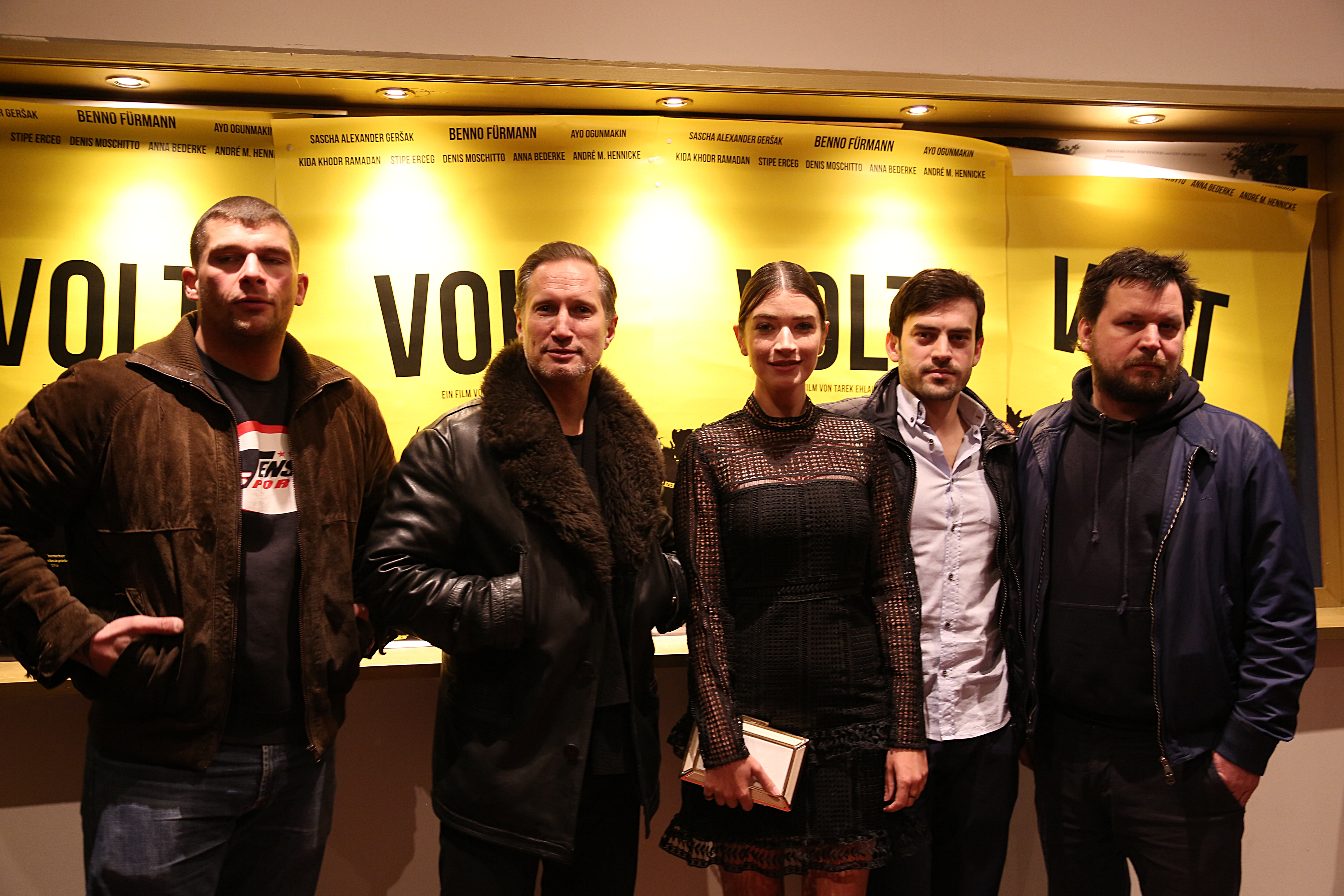 Tarek Ehlail, Benno Fürmann, Anna Bederke, Surho Sugaipov und Sascha Alexander Gersak bei der NRW-Premiere von "Volt", Januar 2017.